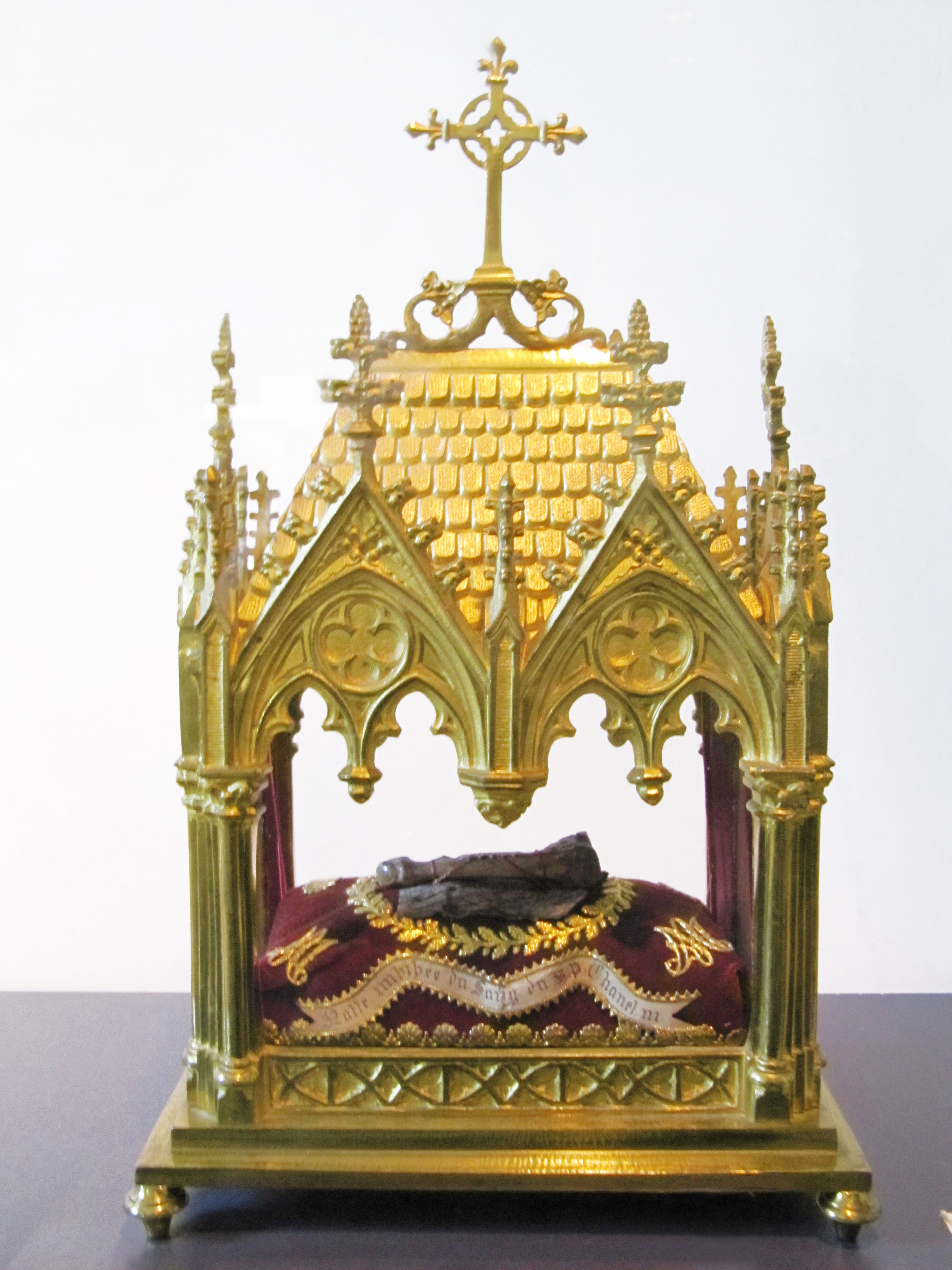 Реликварий с мощами святого Пьера Шанеля, Дом Паулины Жарико, Лион, Франция